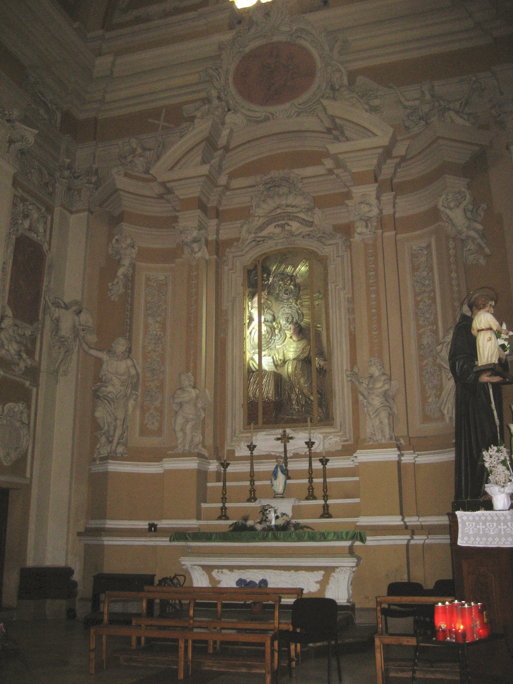 La Cappella di Sant'Antonio, con stucchi di Giuseppe Sammartino, nella chiesa di San Francesco ad Atri.